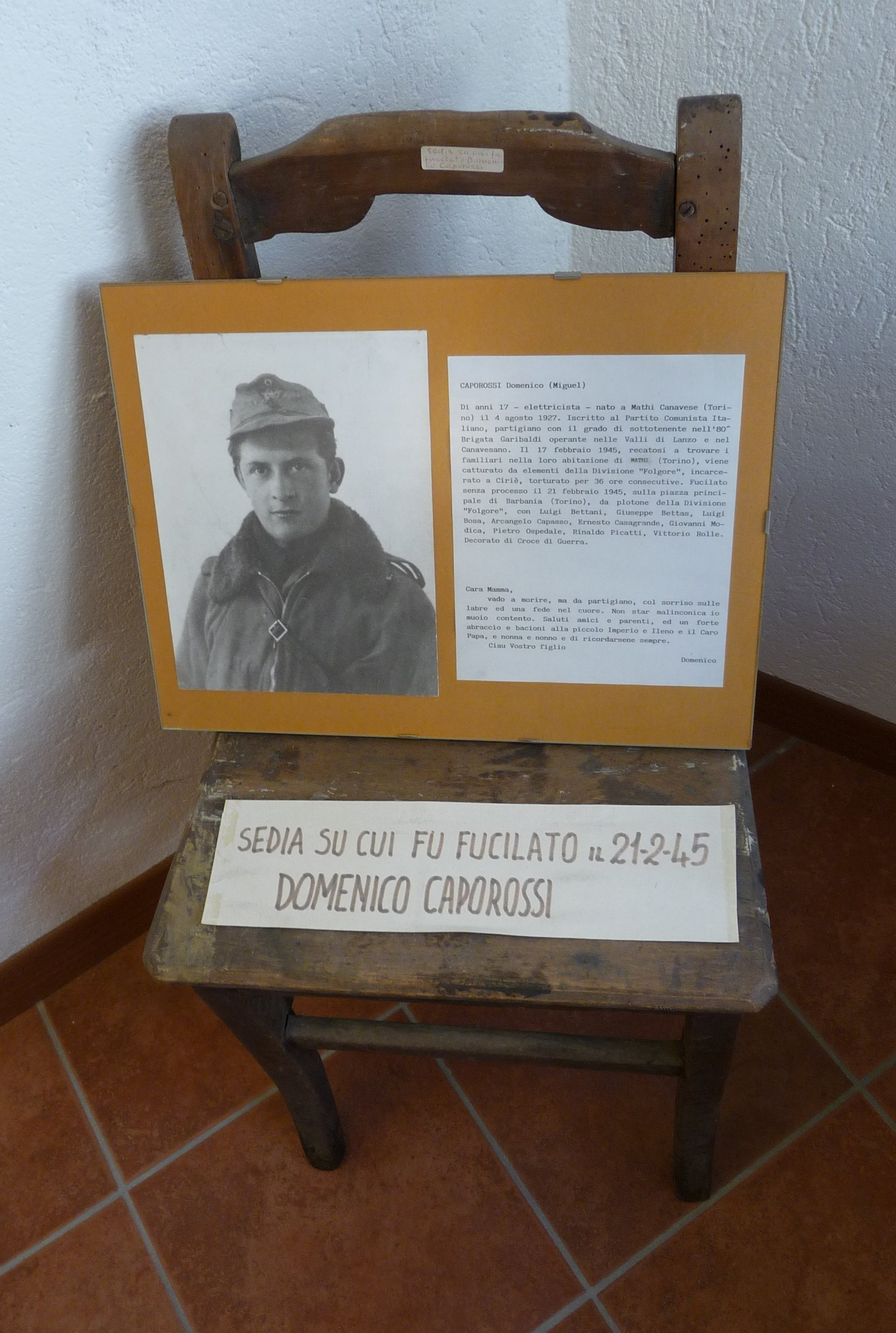 Sedia su cui fu fucilato Domenico Caporossi (Strage di Piazza principale di Barbania)